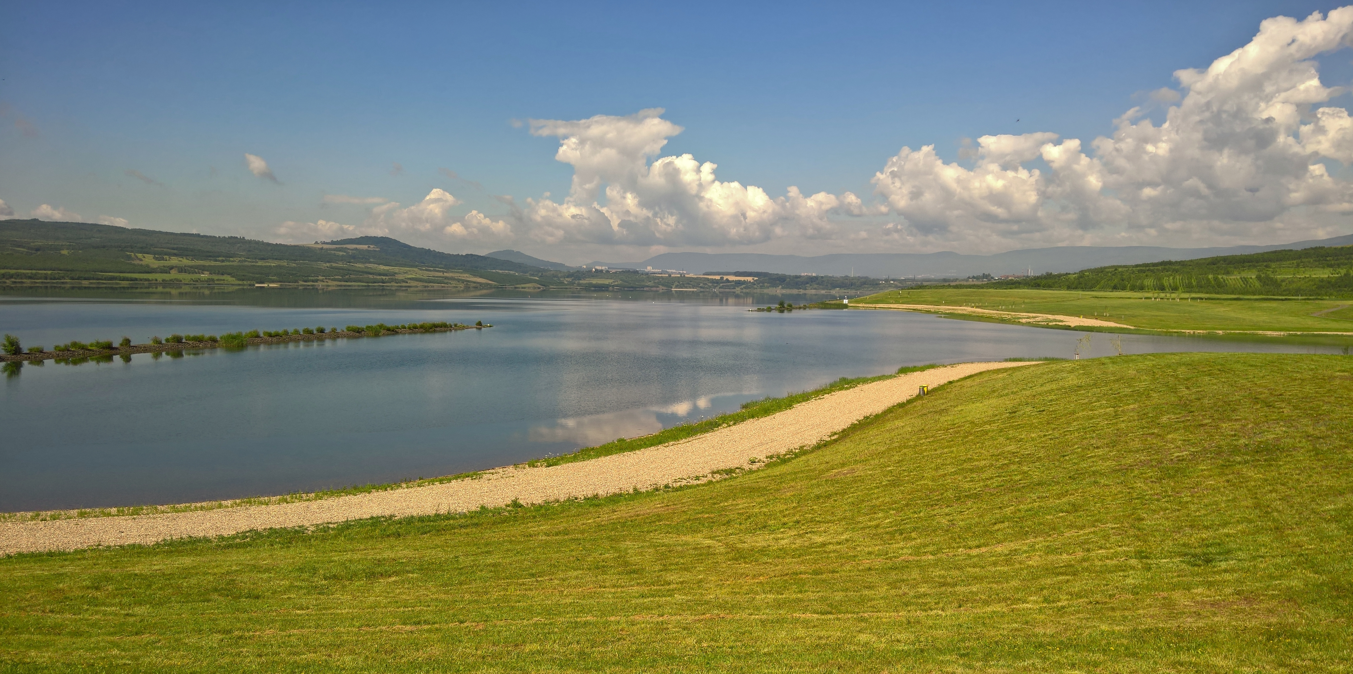 Milada